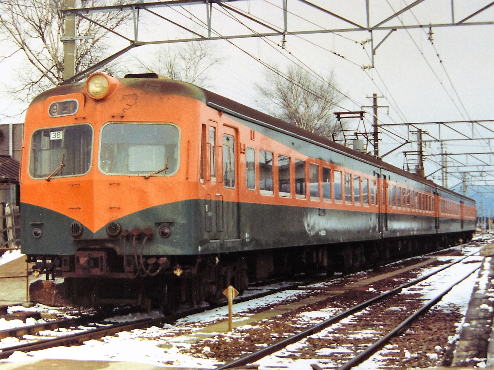 国鉄80系電車 クハ86形 86329